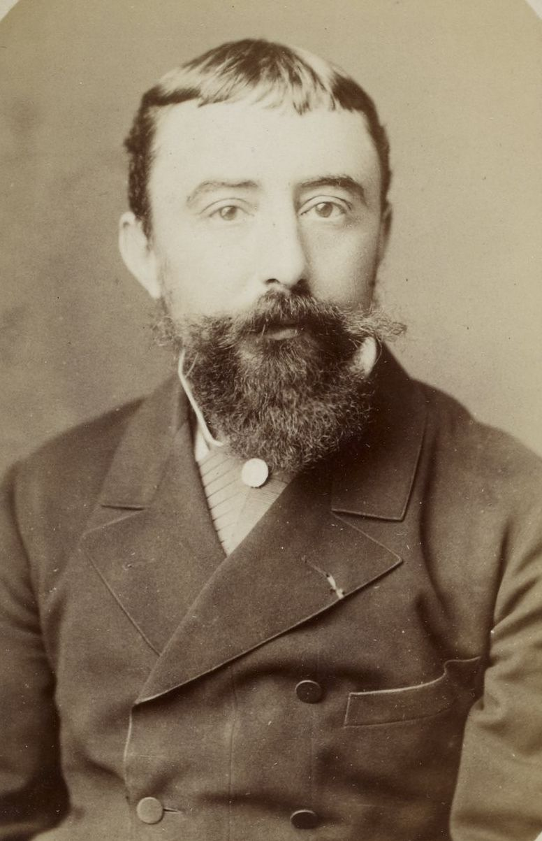 Jean-Marie Bayol par Eugène Pirou